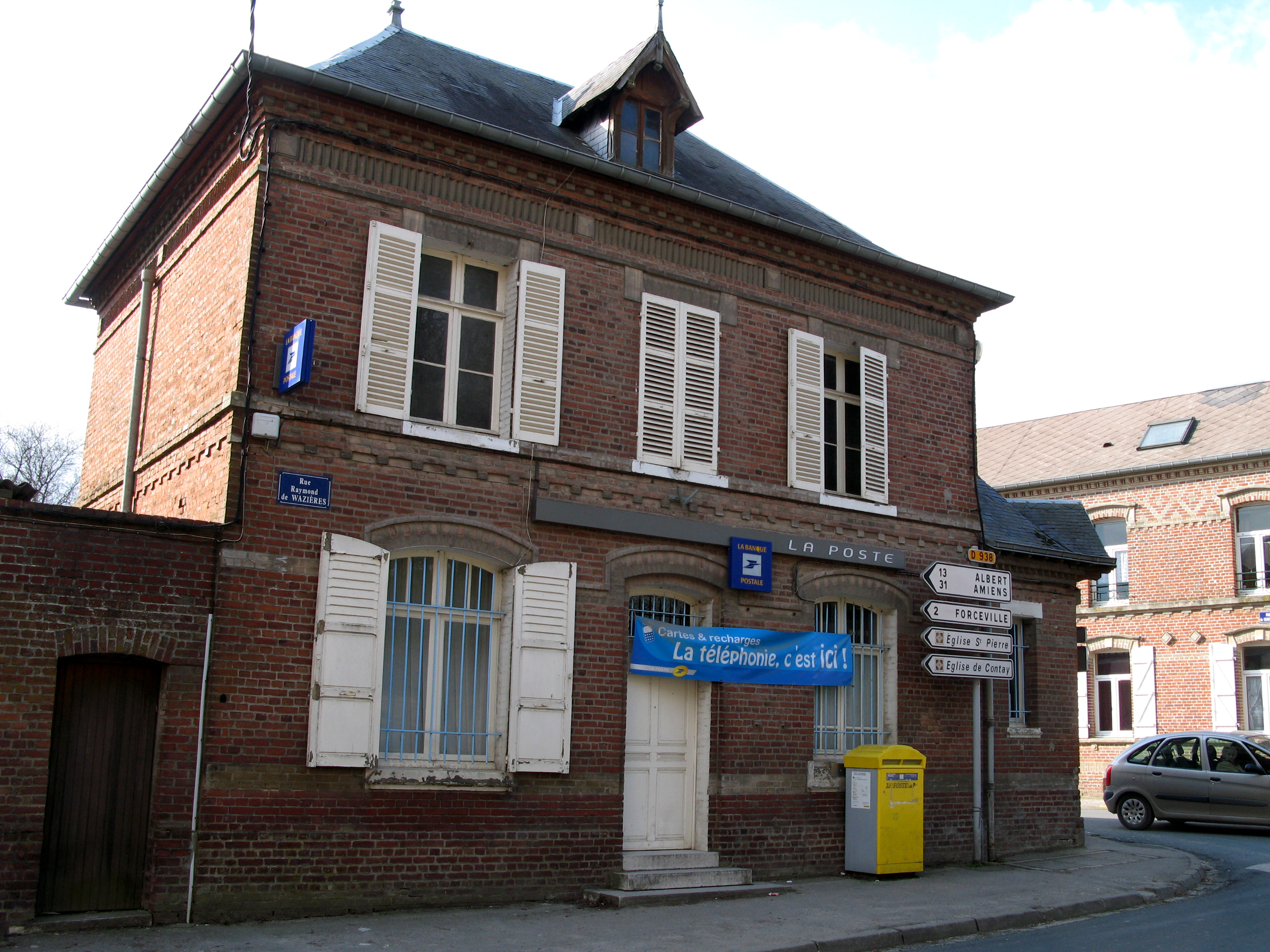 Acheux-en-Amiénois (Somme, France) - La poste fait pratiquement face à l'hôtel-de-ville.